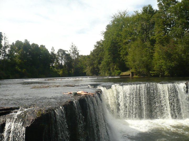 Donguil River